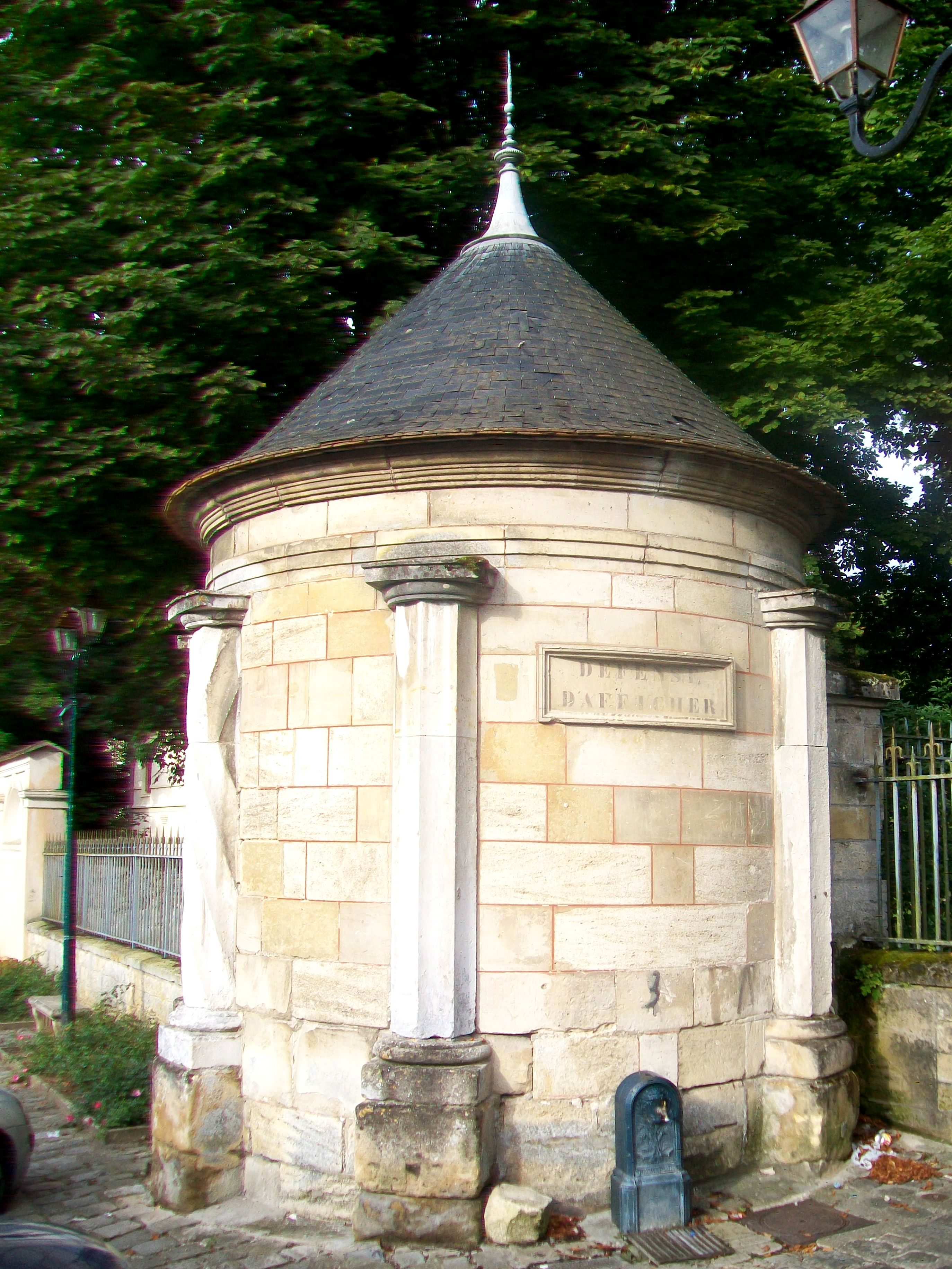 La fontaine d'Amboise, place d'Amboise.